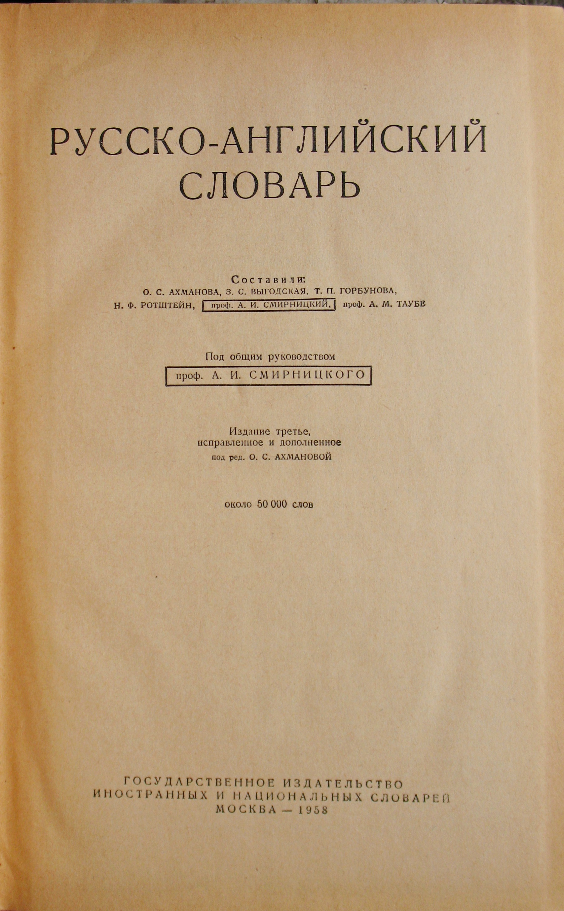 Russian-English Dictionary. Moscow, 1958. Title page. Русско-английский словарь под редакцией профессора А.И. Смирницкого. Москва, 1958, тираж 50000, цена 25-50, 952 стр., размер 265 на 185 мм. Титульный лист на русском (левый).